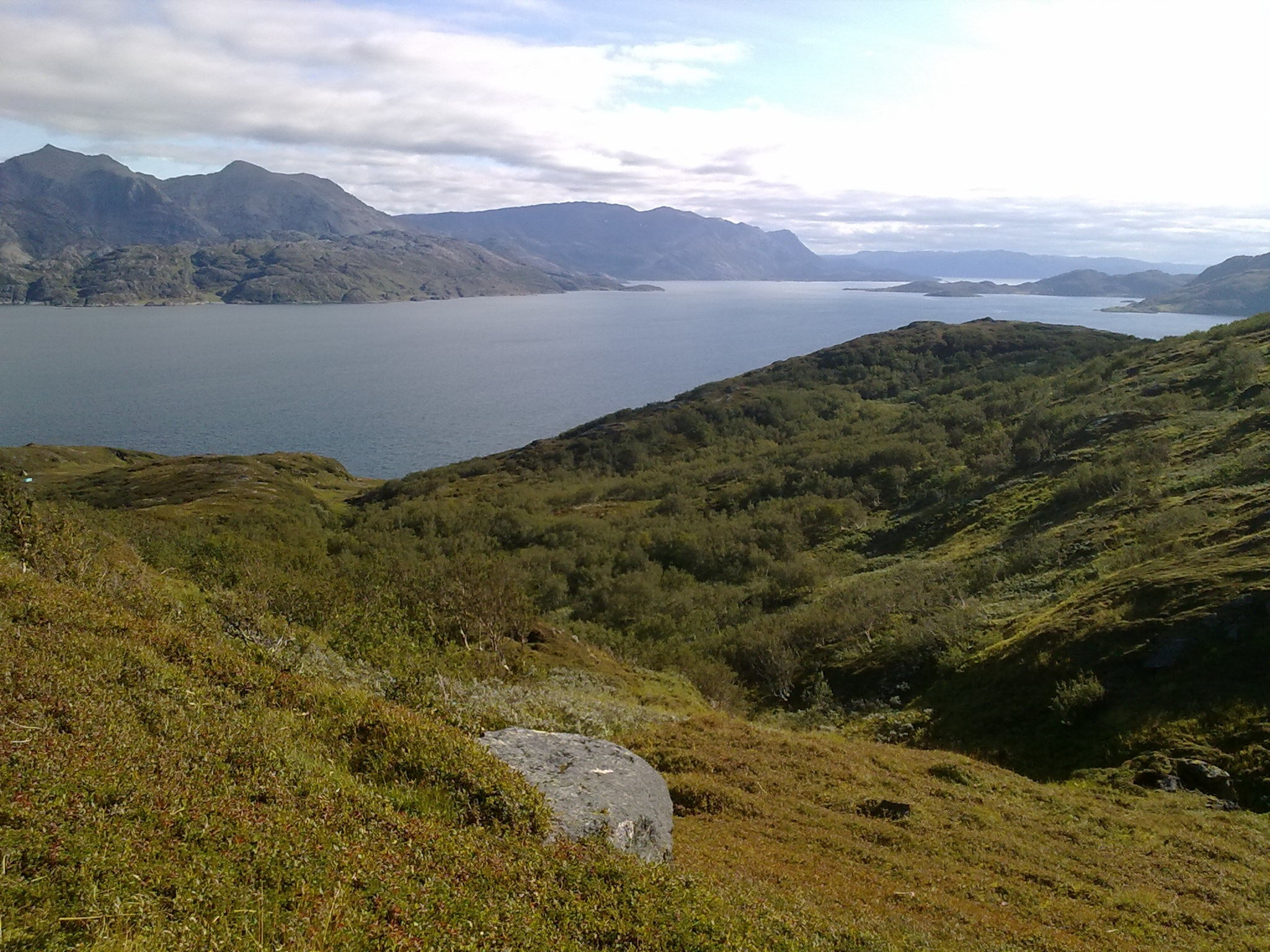 Utsikt mot Seiland og Stjernøya